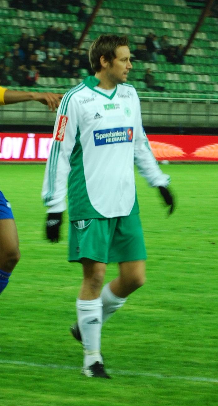 Markus Ringberg, svensk fotballspiller hos Hamarkameratene.